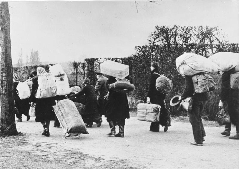 Flüchtlinge 1945 In Richtung Westen bewegen sich die zahllosen Flüchtlinge